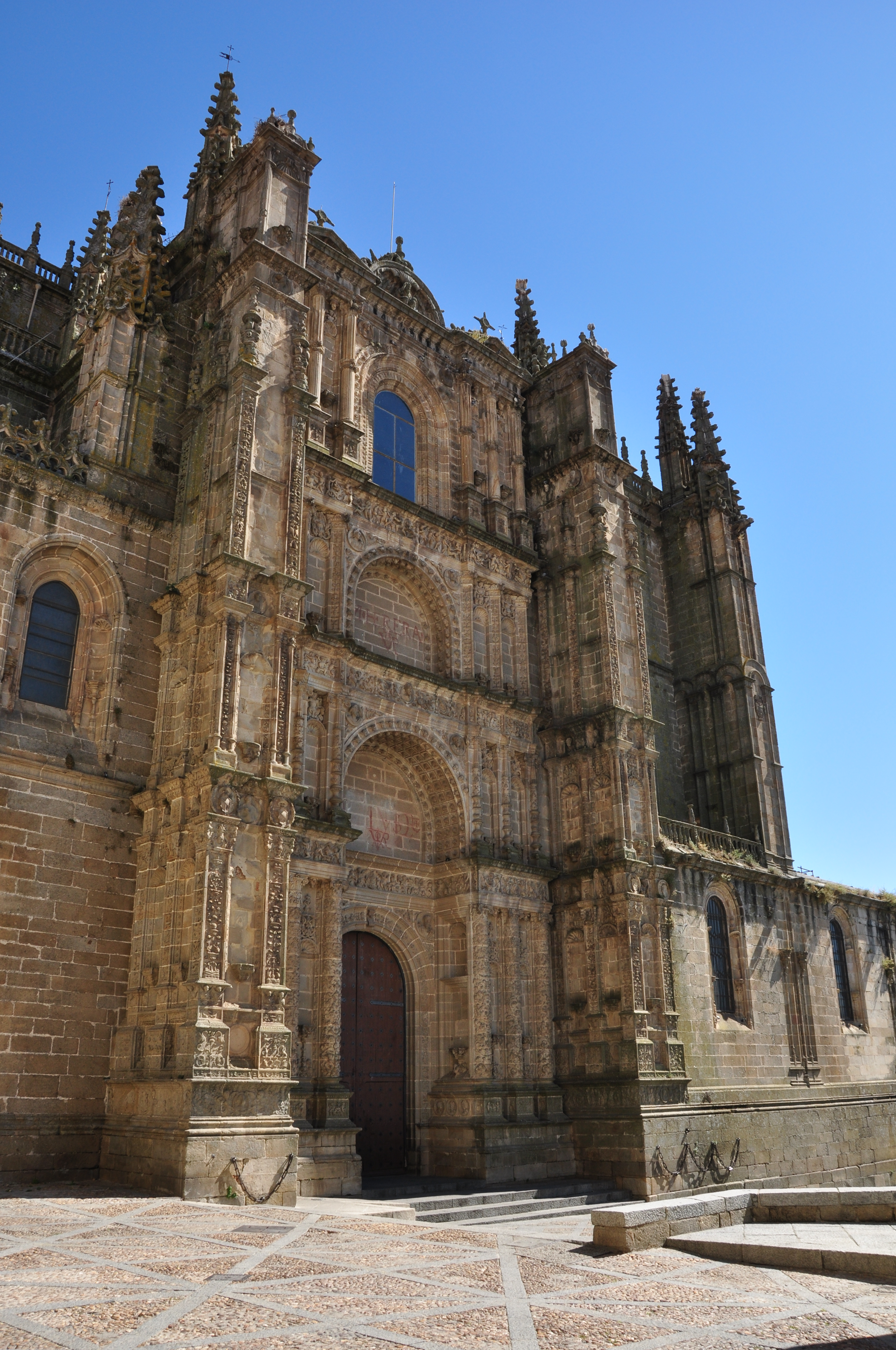 Fachada principal de la Catedral Nueva de Plasencia, obra de Juan de Alava y Gil de Hontañon.